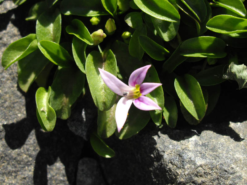 Lobelia oligophylla (Wedd.) Lammers (Syn. Hypsela reniformis)